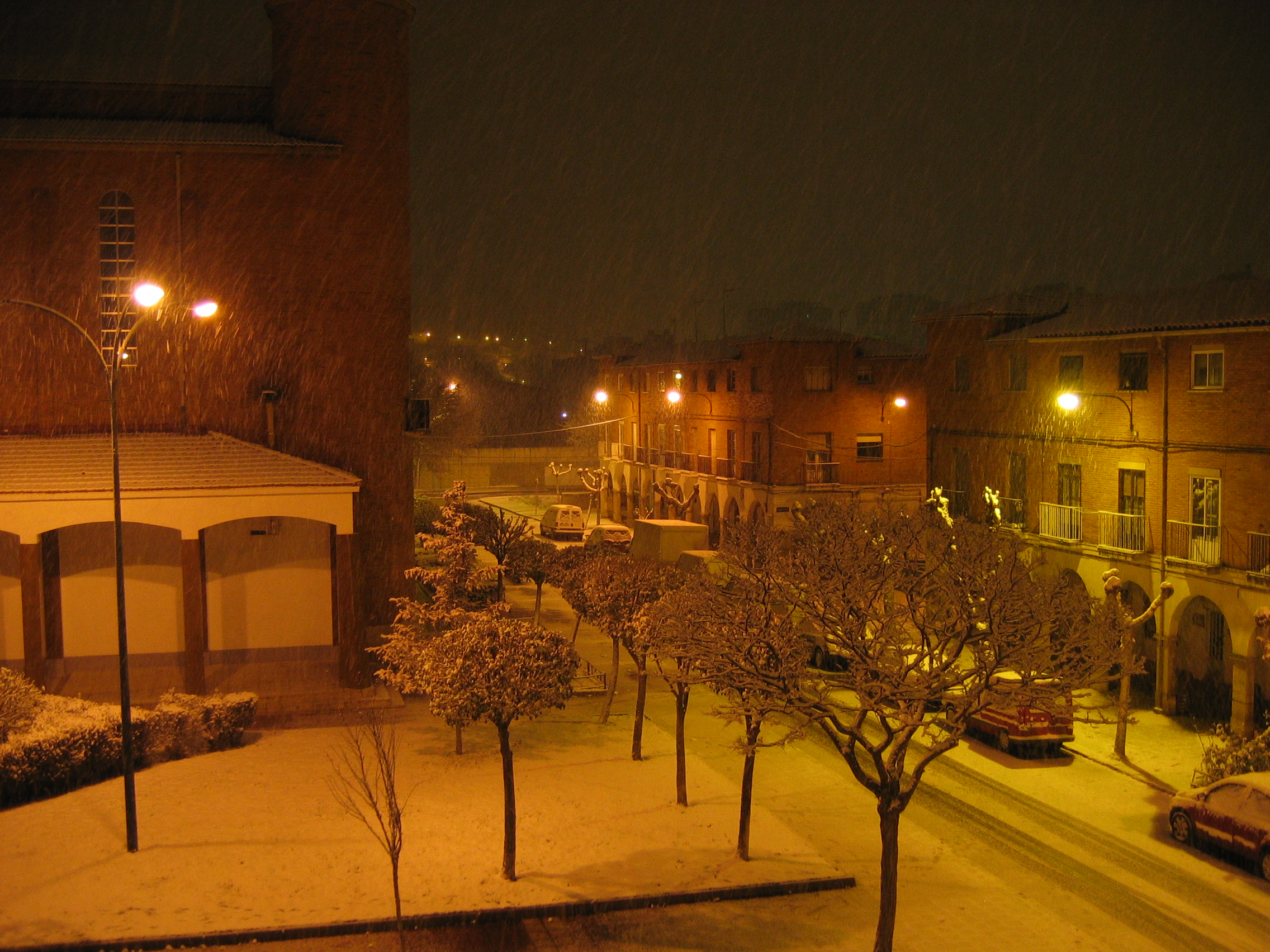 Plaza Porticada del Barrio de Girón de Valladolid nevada.